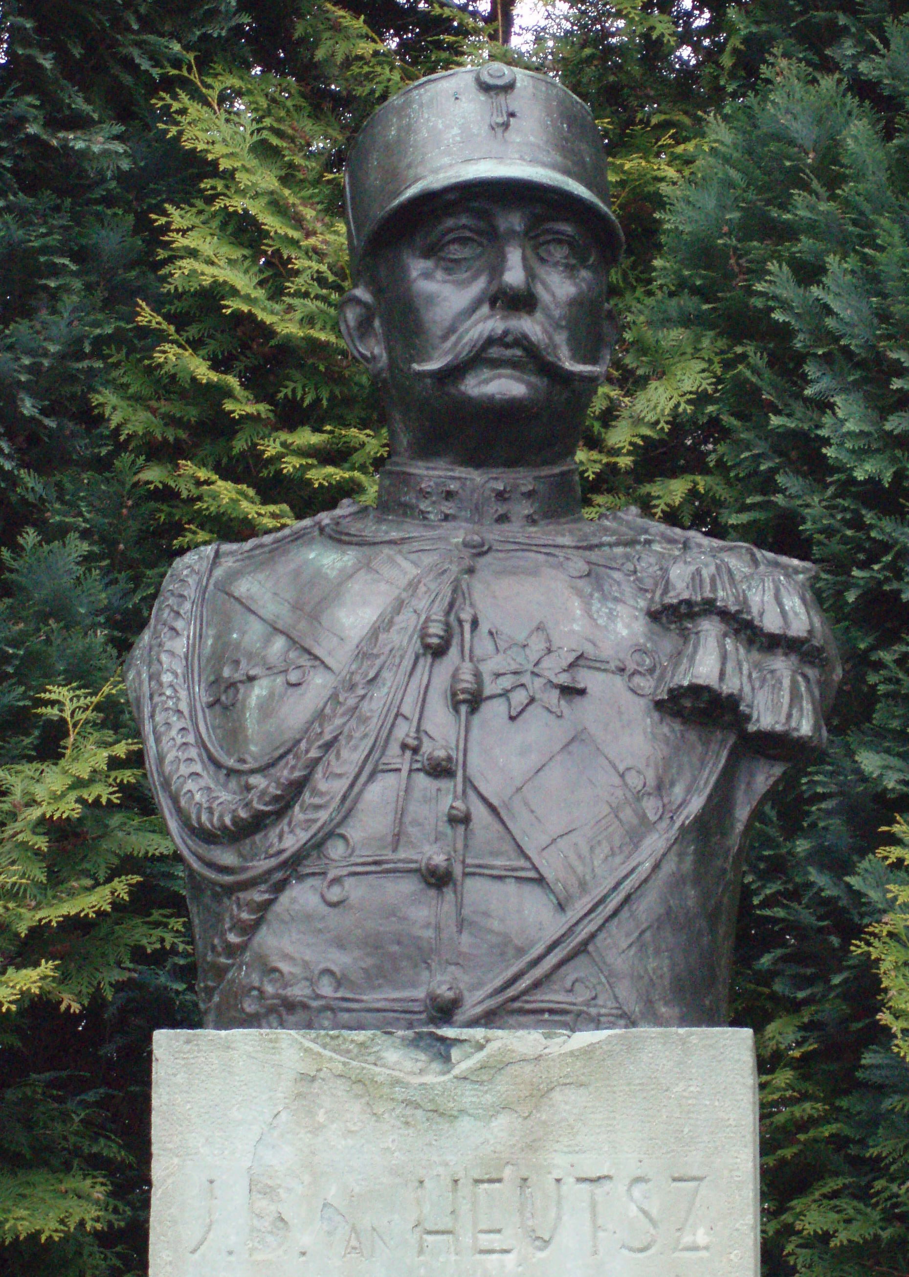 Borstbeeld van Joannes Benedictus van Heutsz in zijn geboorteplaats Coevorden.